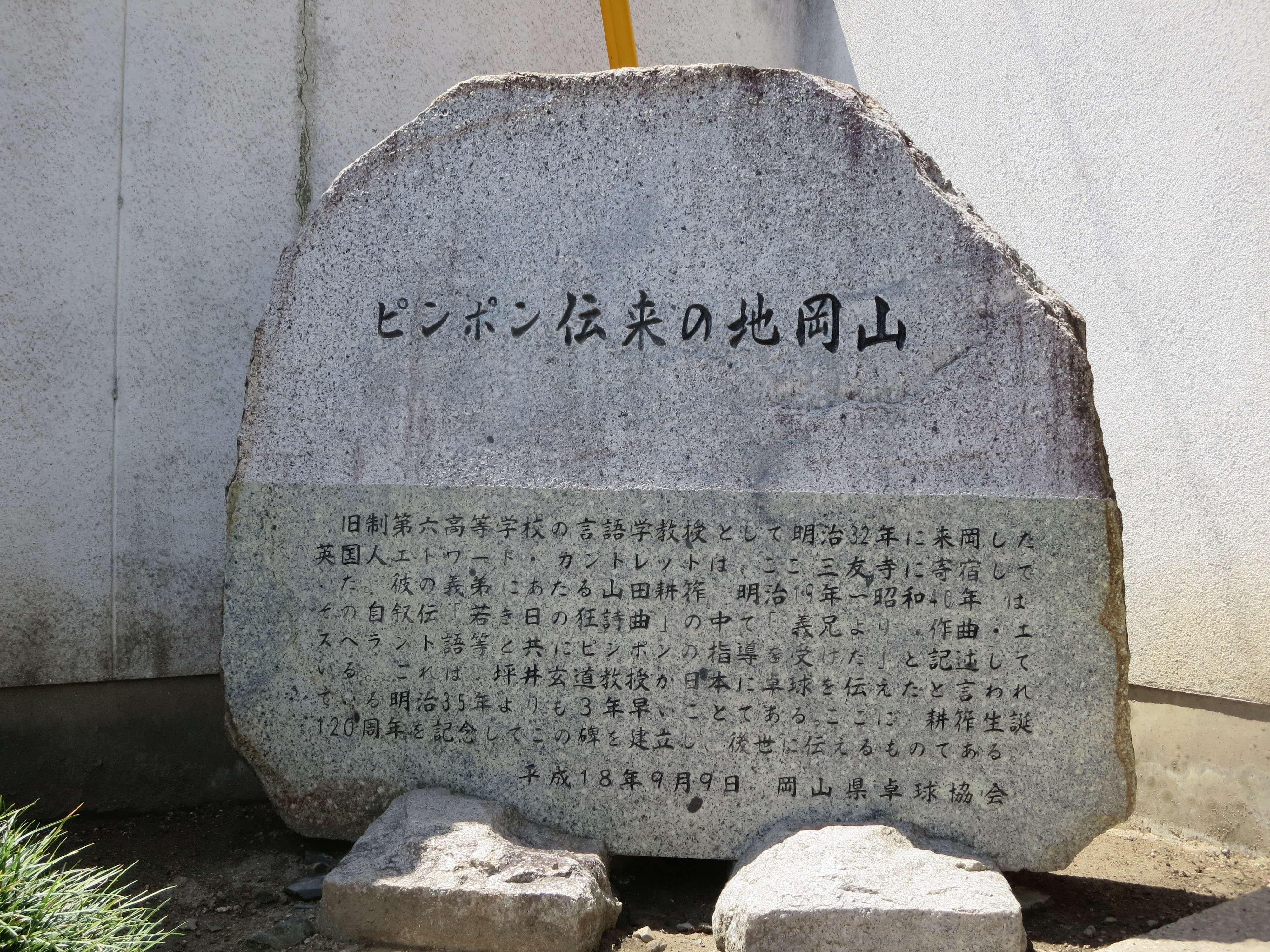 岡山市中区門田屋敷にある三友寺の山門向かって左手にある碑。作曲家の山田耕筰が、１５歳のときに義兄のガントレットの指導で日本で最初にピンポンをした場所。